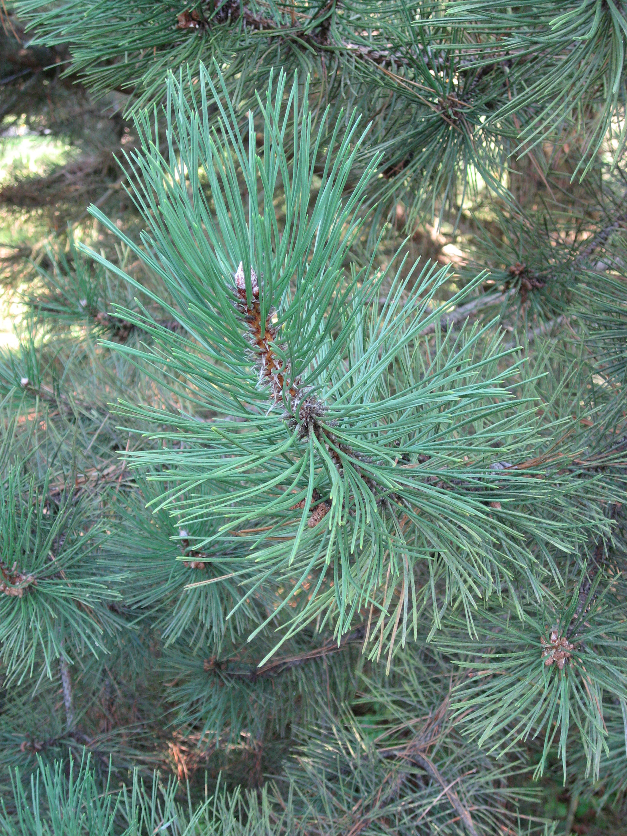 Pinus nigra var. corsicana (syn. P. n. laricio) in Arboretum de La Roche-Guyon Map: 49° 5' 56" N 1° 38' 23" E